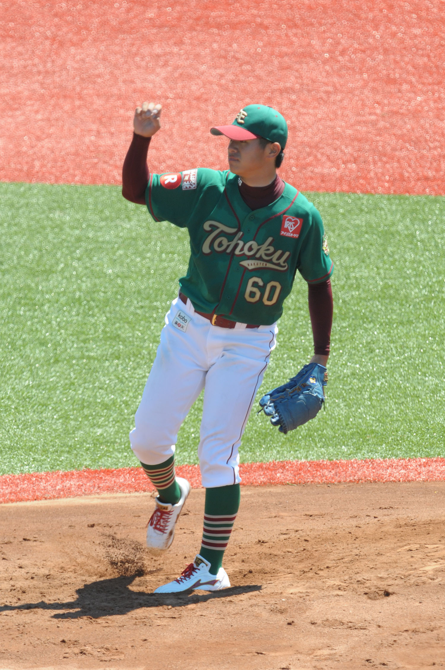 楽天イーグルス投手の古川侑利。水林グリーンスタジアムにて。